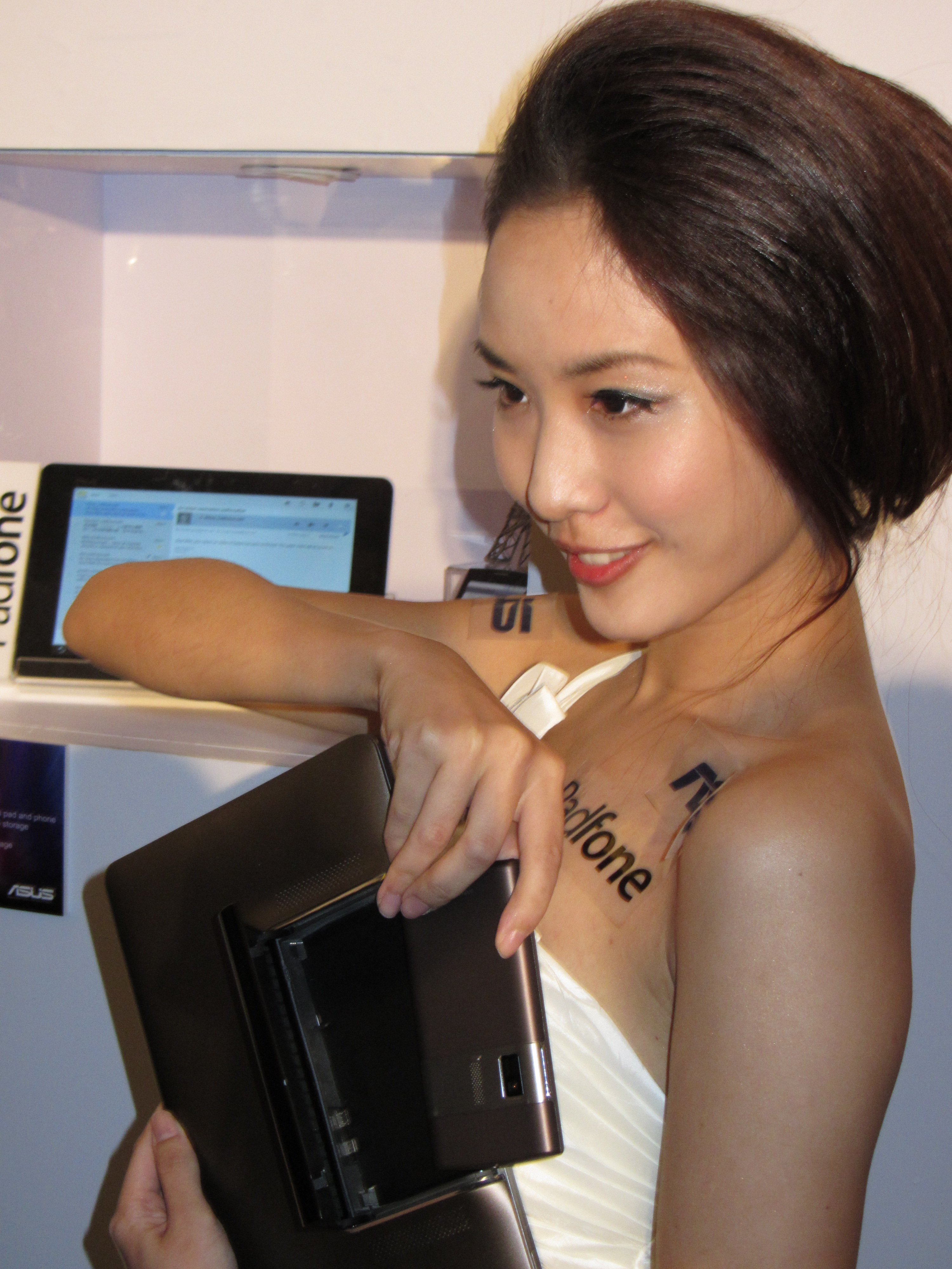 中文（台灣）: 2011台北國際電腦展，華碩電腦PadFone宣傳模特兒。